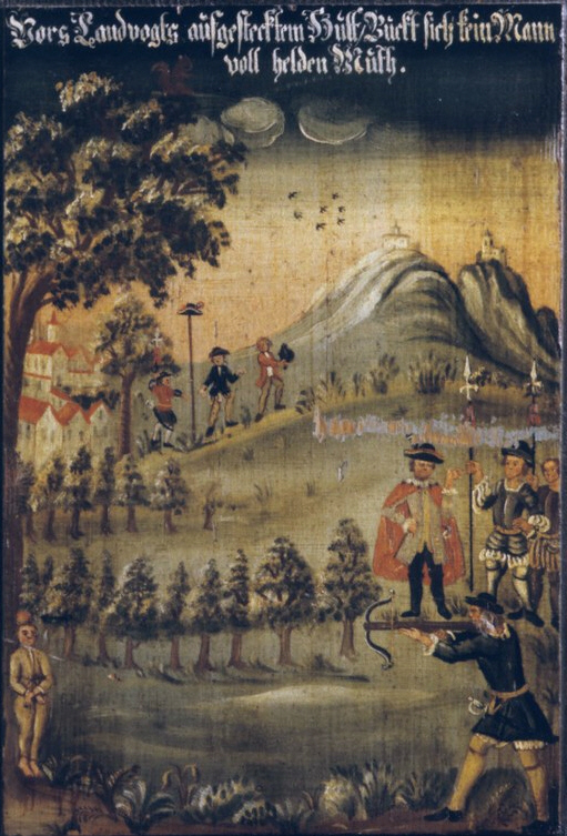 Tellsage, Detail von der Tür eines bemalten Bauernschranks, Ostschweiz, 1782 Schweizerisches Landesmuseum, Zürich